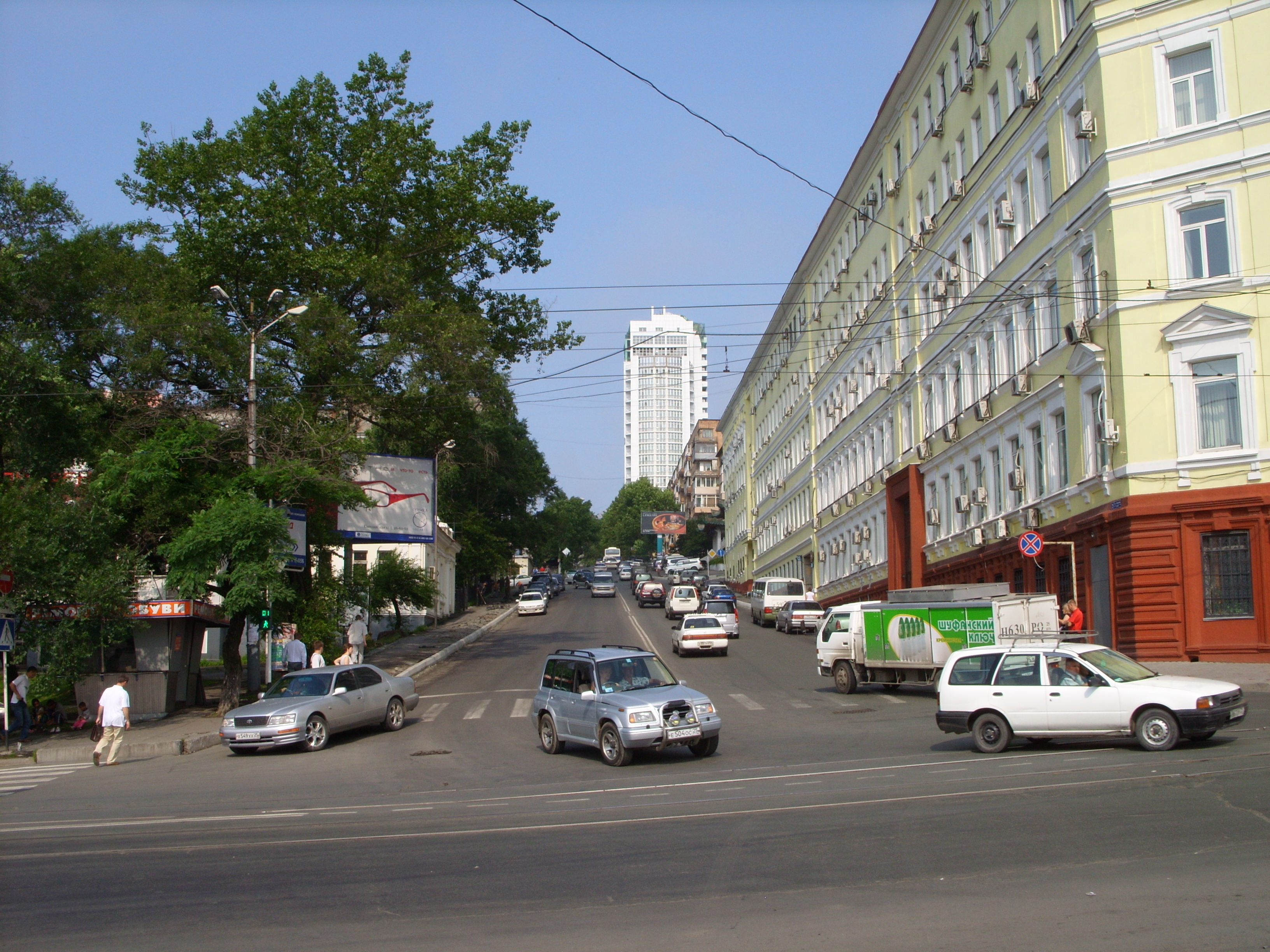 снимки августа 2007 г.